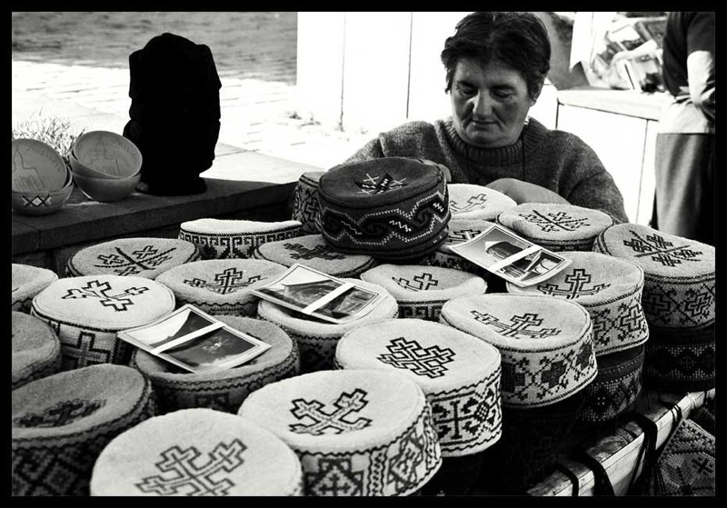 Mtskheta Georgia